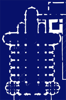 La pianta della chiesa di San Sisto a Piacenza